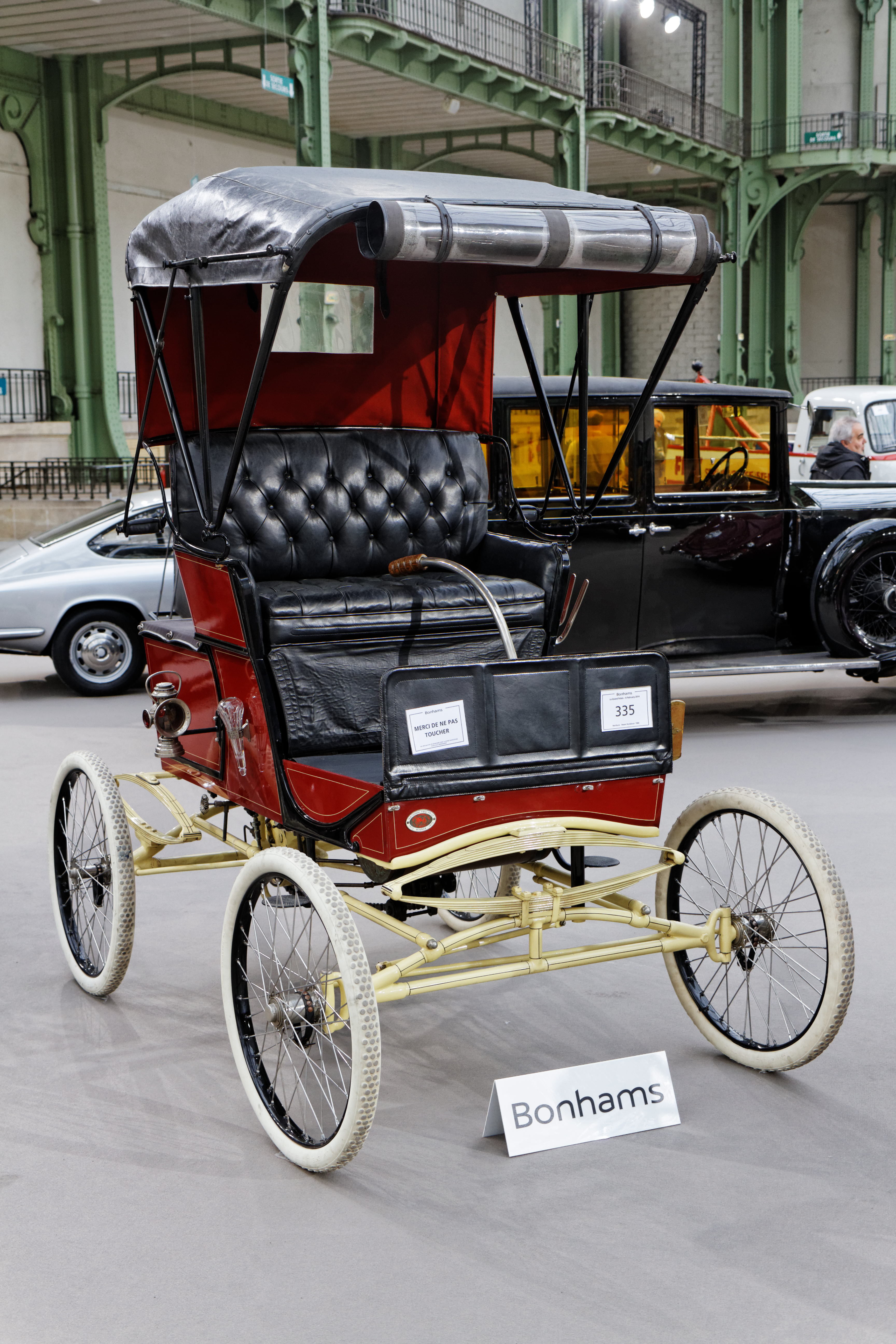 Une Marlboro Steam Runabout au Grand Palais lors de la vente Bonhams en février 2014.